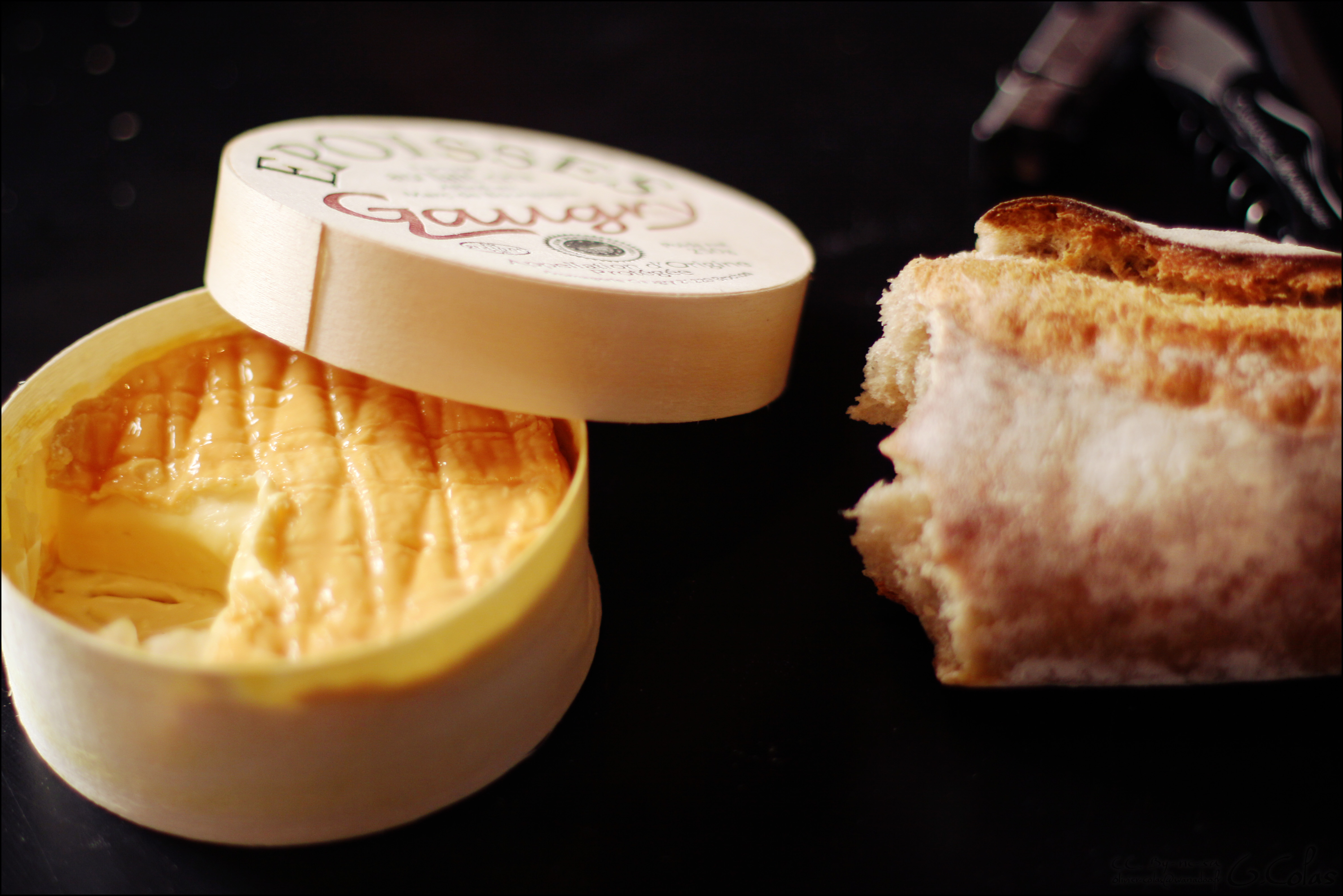 Epoisses dans sa boite en bois et baguette de pain